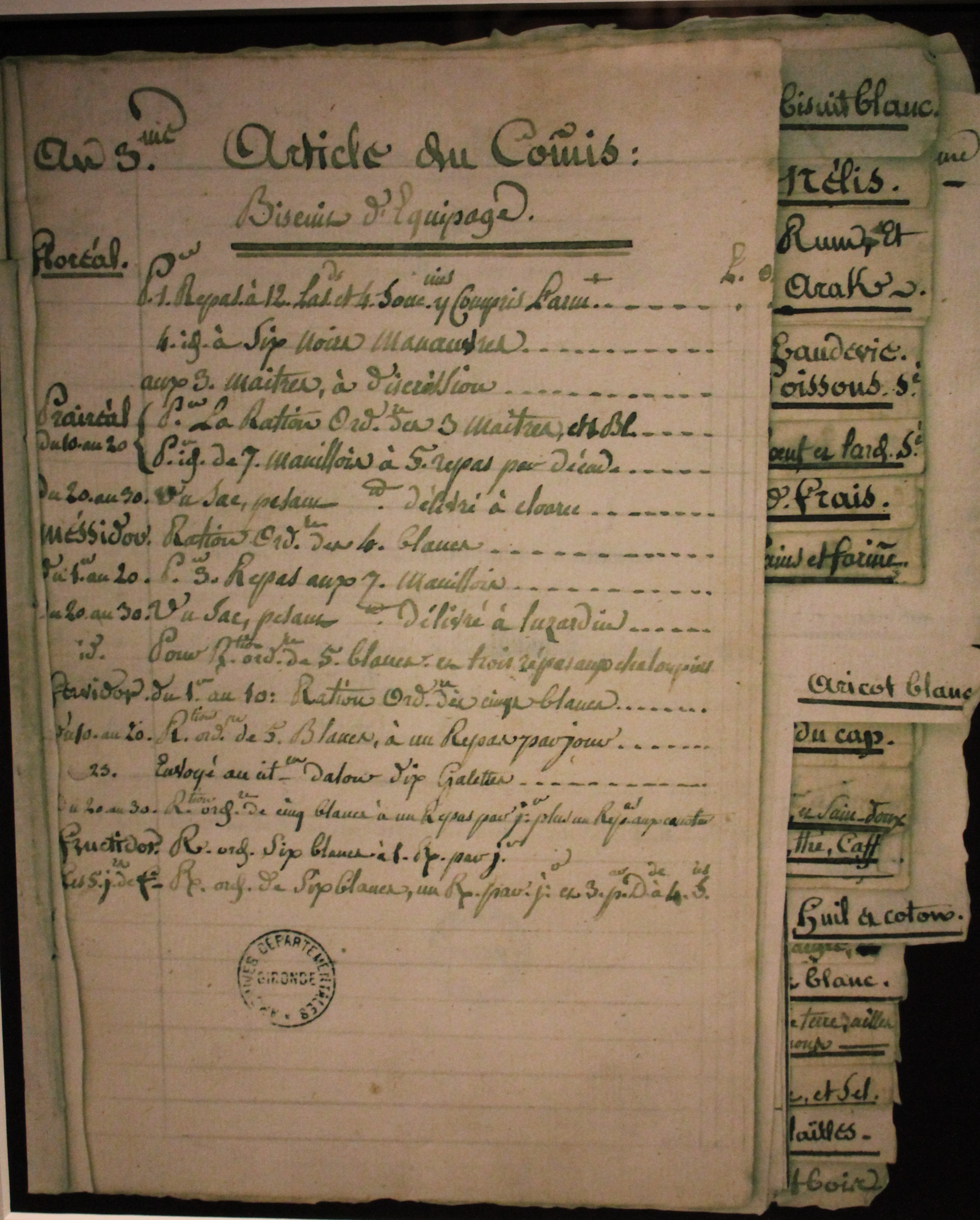 Cahier de cambuse de "la Céline", 1795, où sont consignés les consommations de vivres par l'équipage. Archives départementales de la Gironde, présenté au musée d'Aquitaine à Bordeaux.